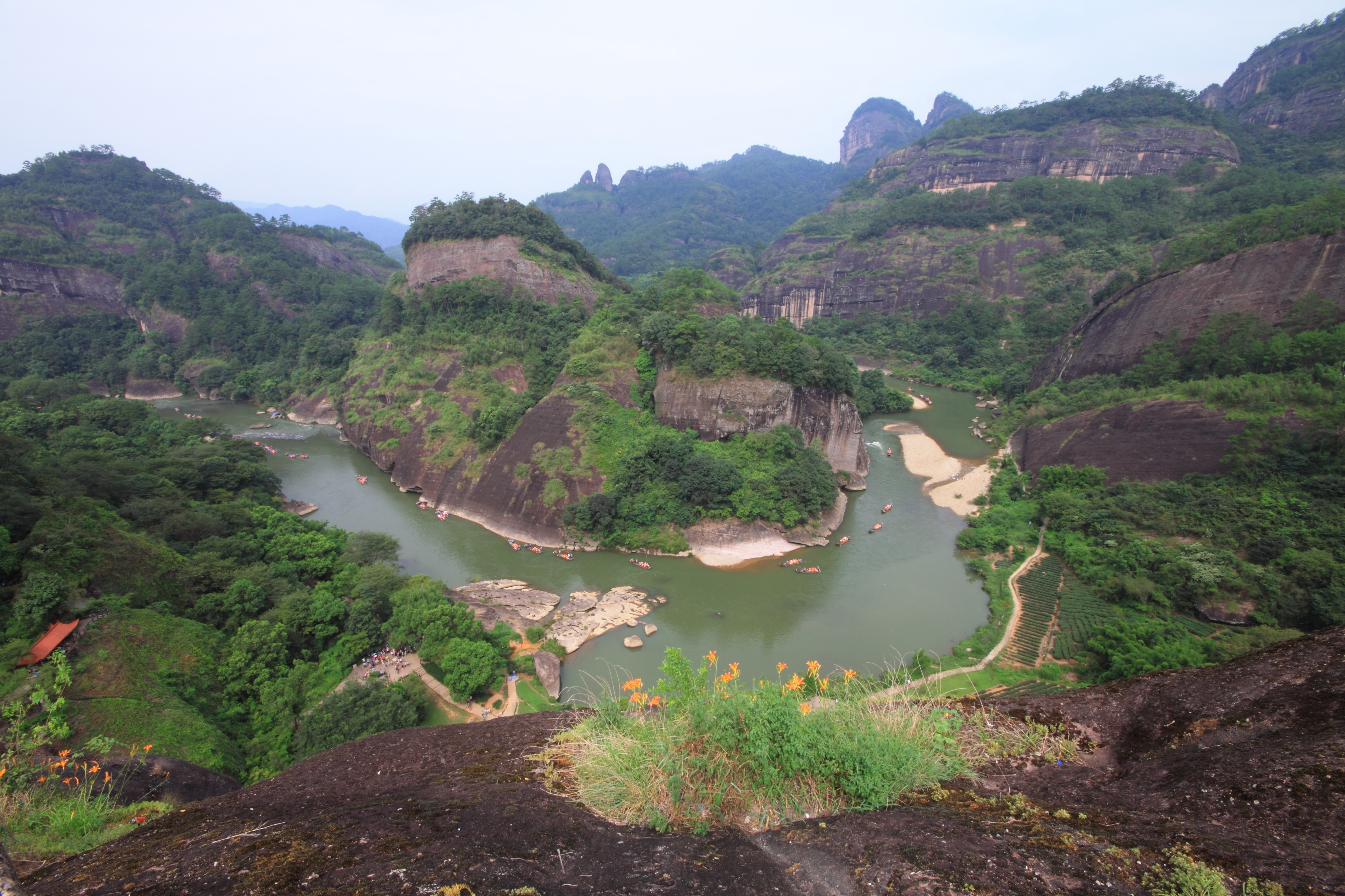 九曲溪——六曲（摄于天游峰登山道）